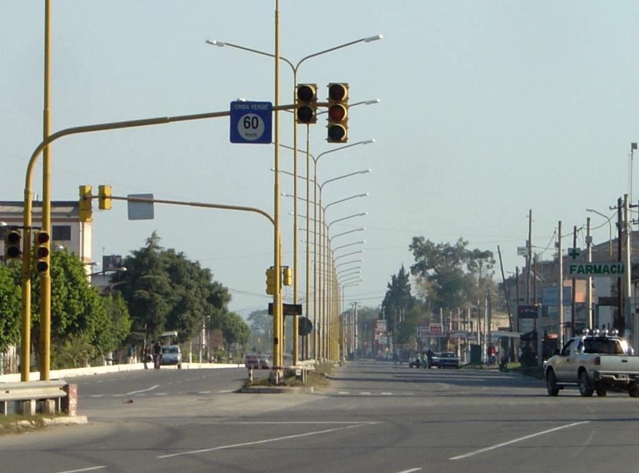 Ruta Provincial 301 (antiguo "Camino del Perú") a su paso por El Manantial/301 Highway, El Manantial, Lules Department, Tucumán, Argentina